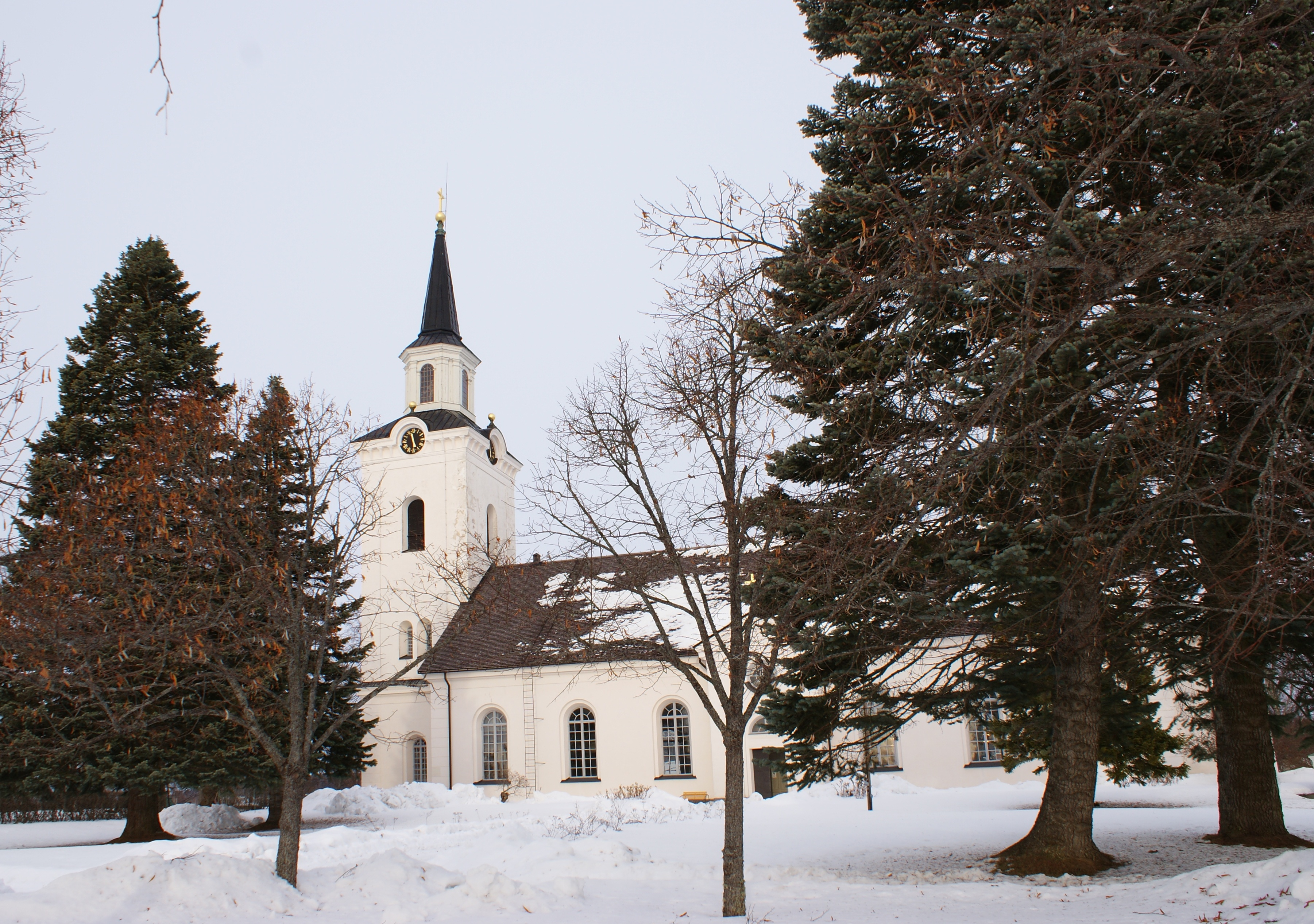 Siljansnäs kyrka, januari 2011.